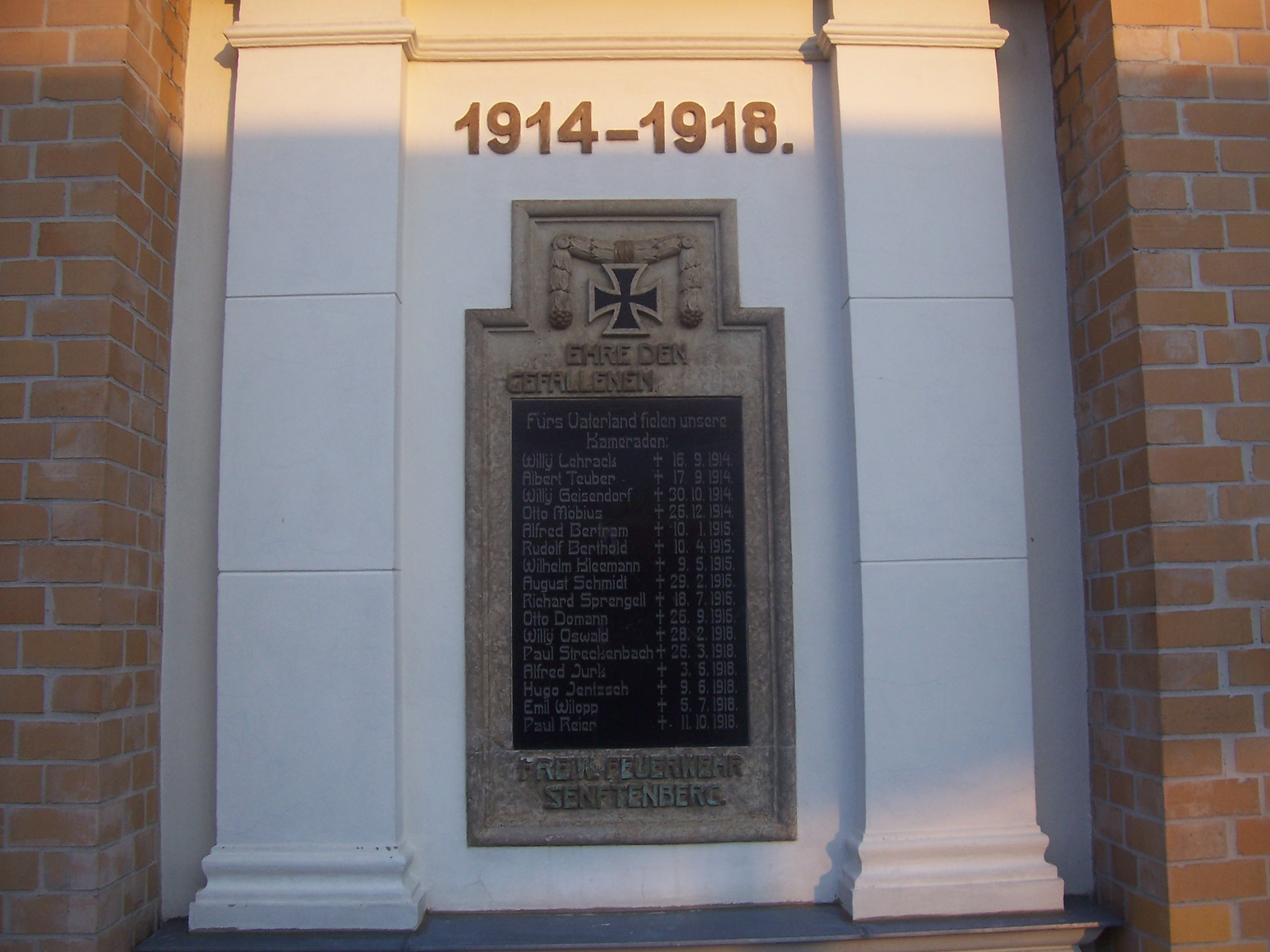 Gedenktafel für die im Ersten Weltkrieg gefallenen Kameraden der Senftenberger Feuerwehr